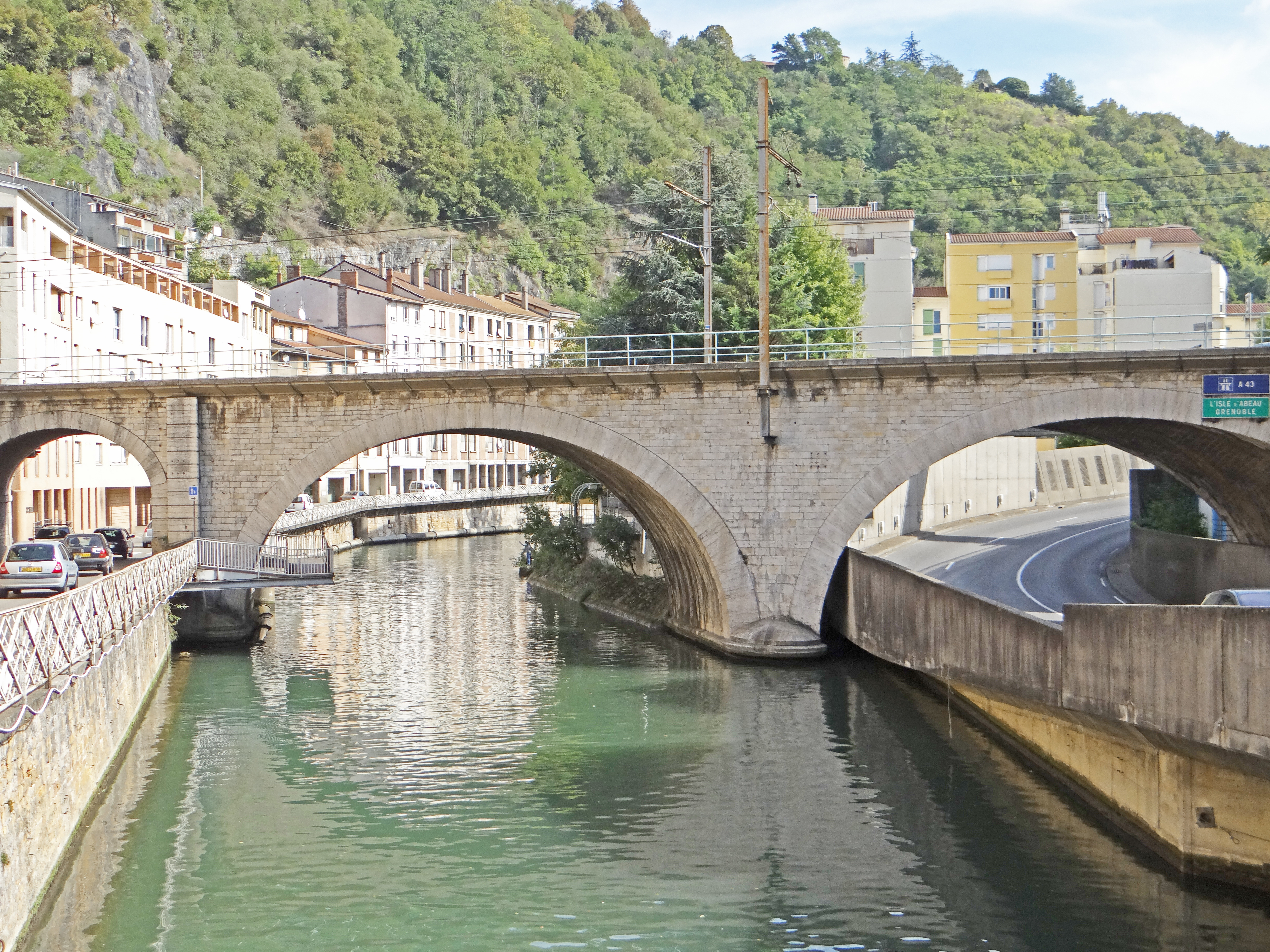 Vienne - Pont ferroviaire sur la Gère